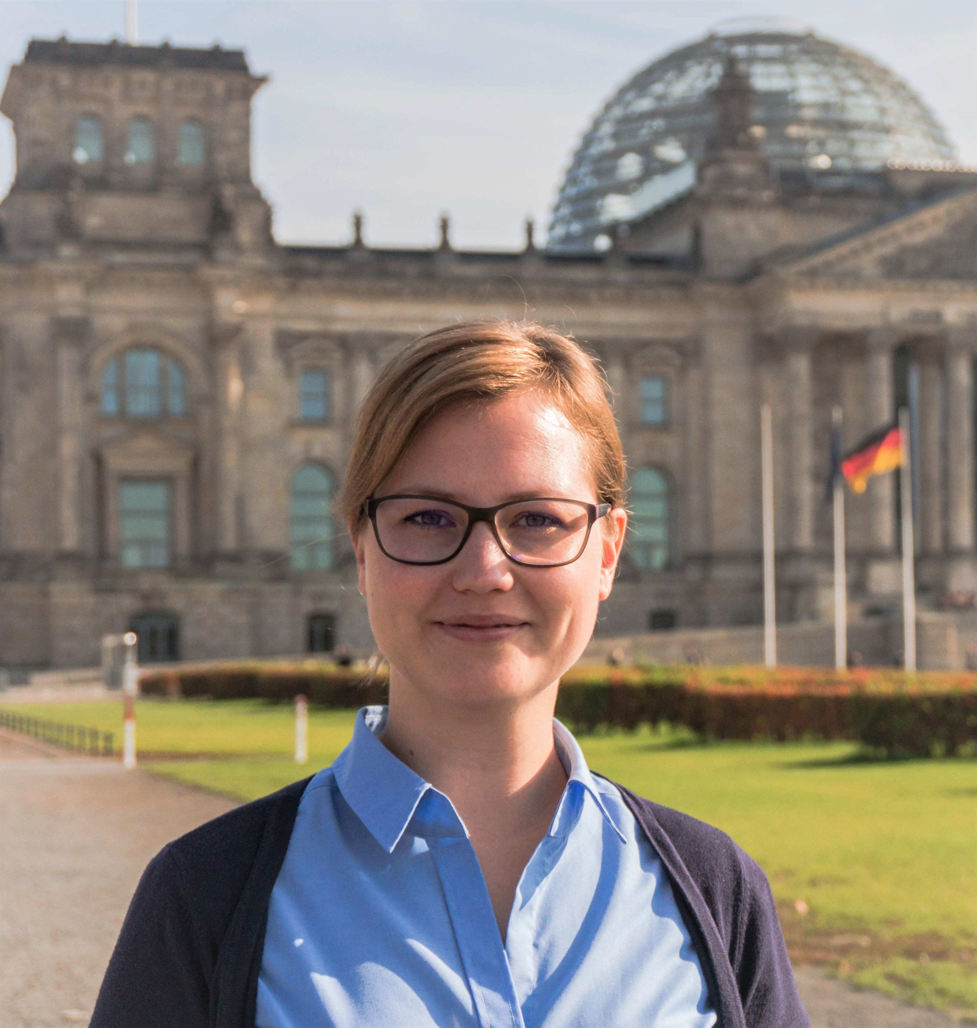 Katharina Willkomm im Oktober 2019 vor der Westseite des Reichstagsgebäudes in Berlin